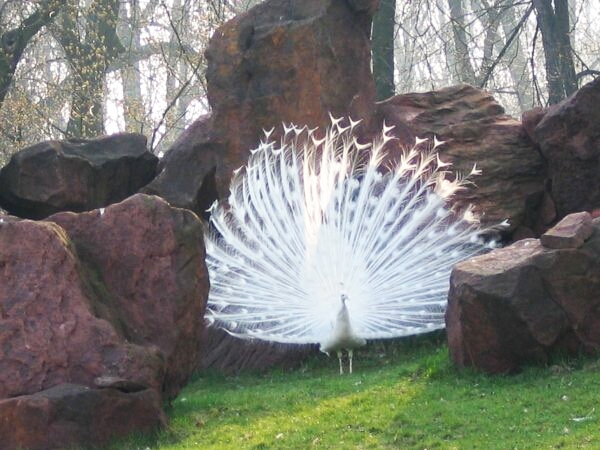 Pavo cristatus mut. alba